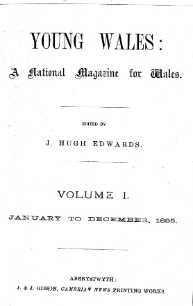 Clawr y Cylchgrawn New Wales